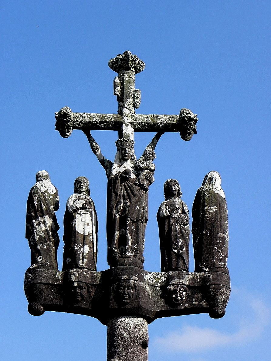 Trémaouézan (29). Croix-calvaire de l'enclos paroissial. 1530.